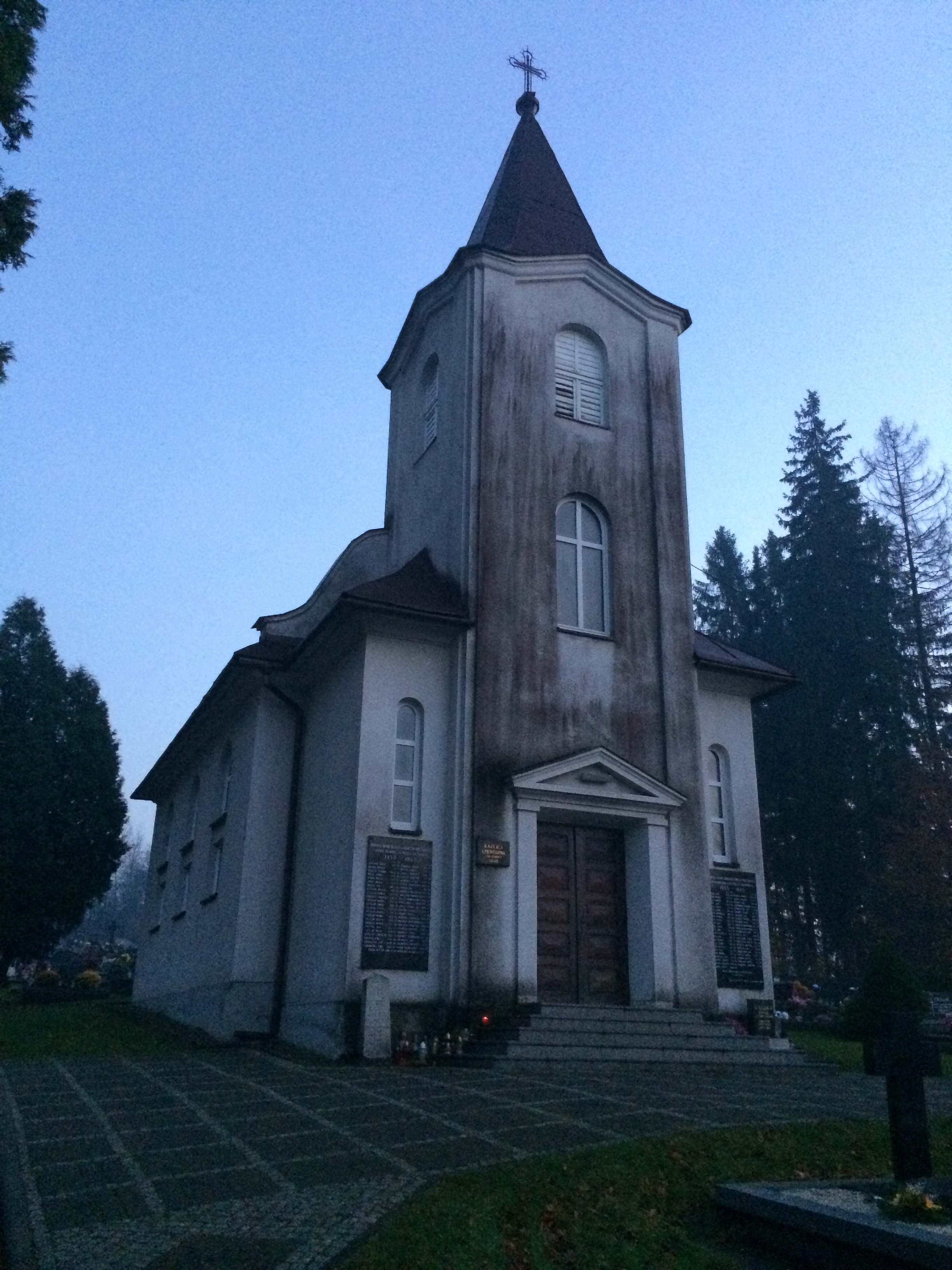 Kaplica na cmentarzu ewangelickim w Wisle